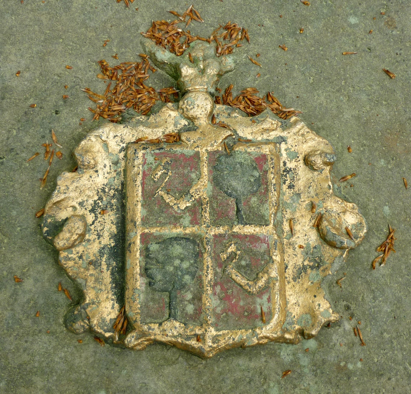 Wappen auf der Grabstätte des Oberforstmeisters Heinrich Maximilian von Klotz († 28. Nov. 1884) auf dem Hofehübel bei Bärenfels im Osterzgebirge